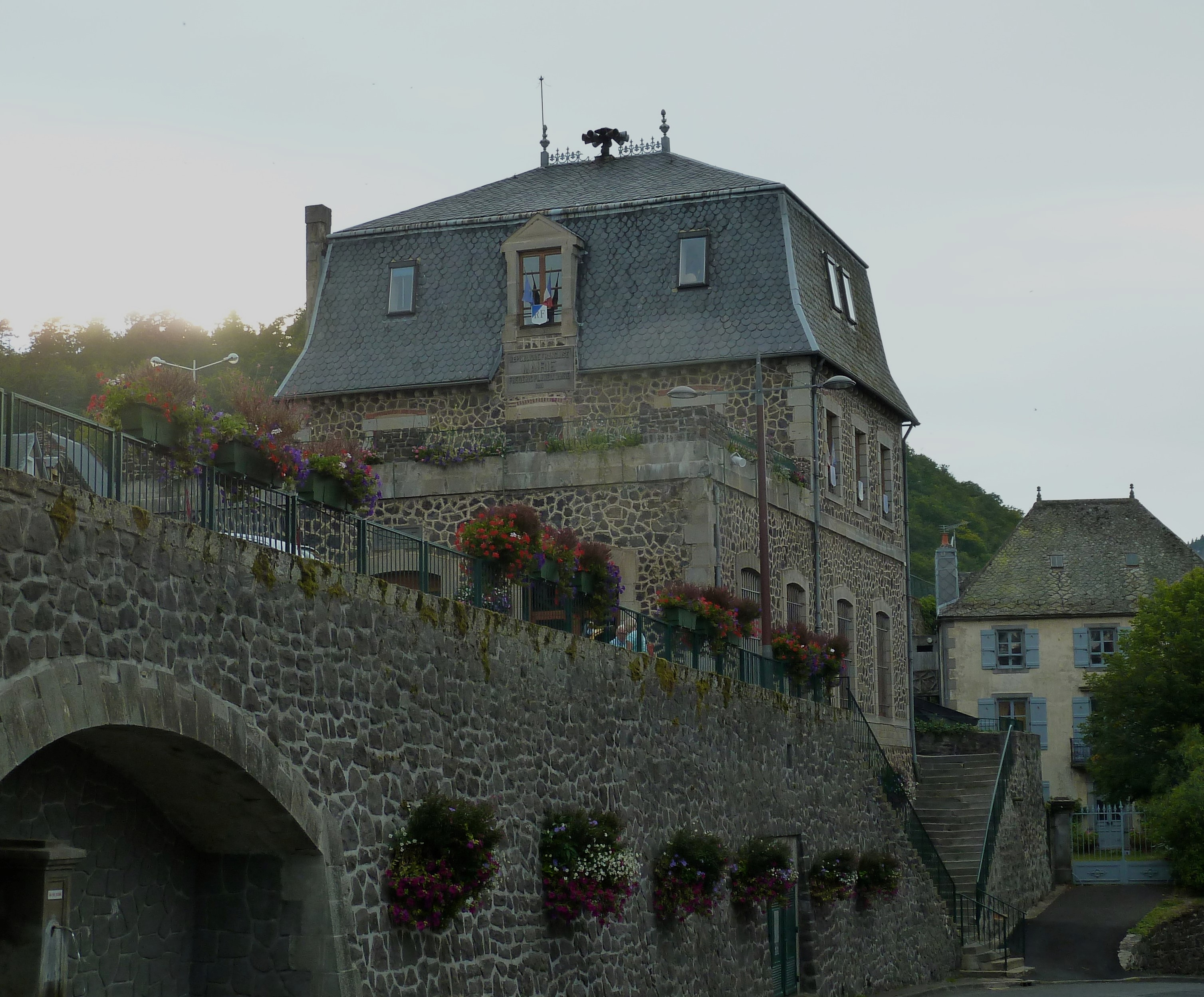 La mairie de Murol, Puy-de-Dôme.- (Auvergne).- France.